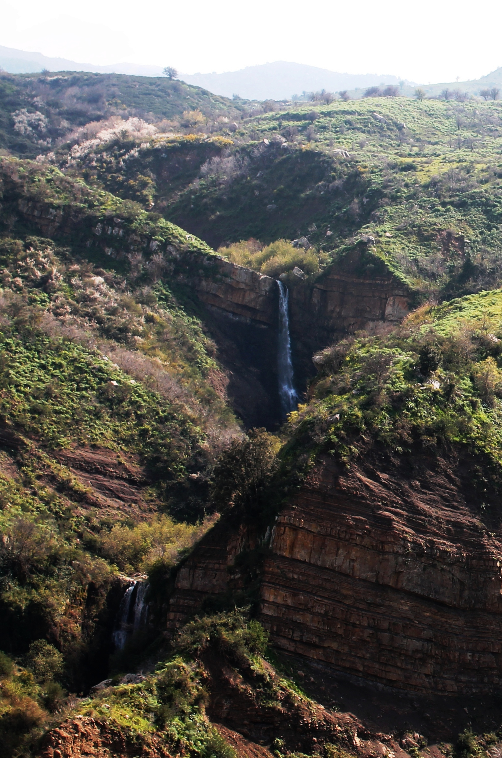 Sicilia, Mistretta